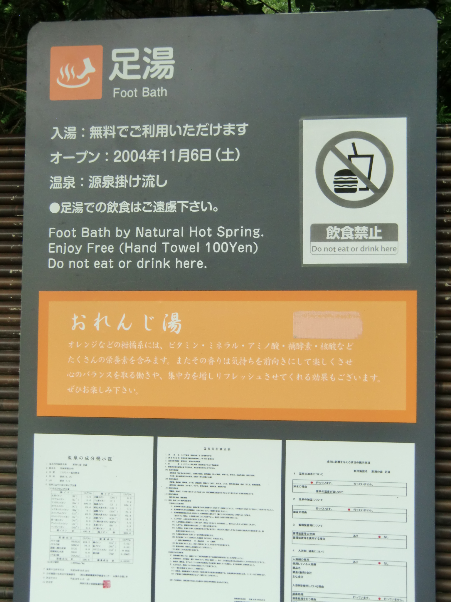 CIMG0306